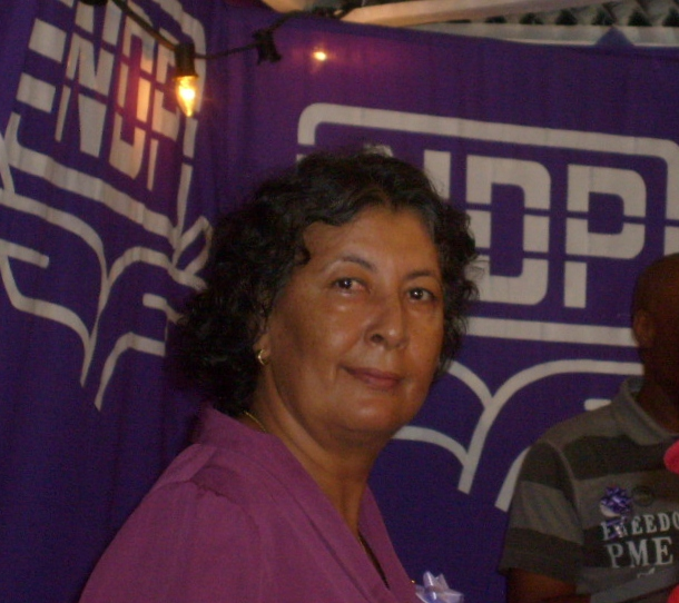 Jennifer Simons auf einer Parteiversammlung der Nationaldemokratischen Partei an der Tourtonnelaan in Paramaribo, Suriname am 08-11-2009